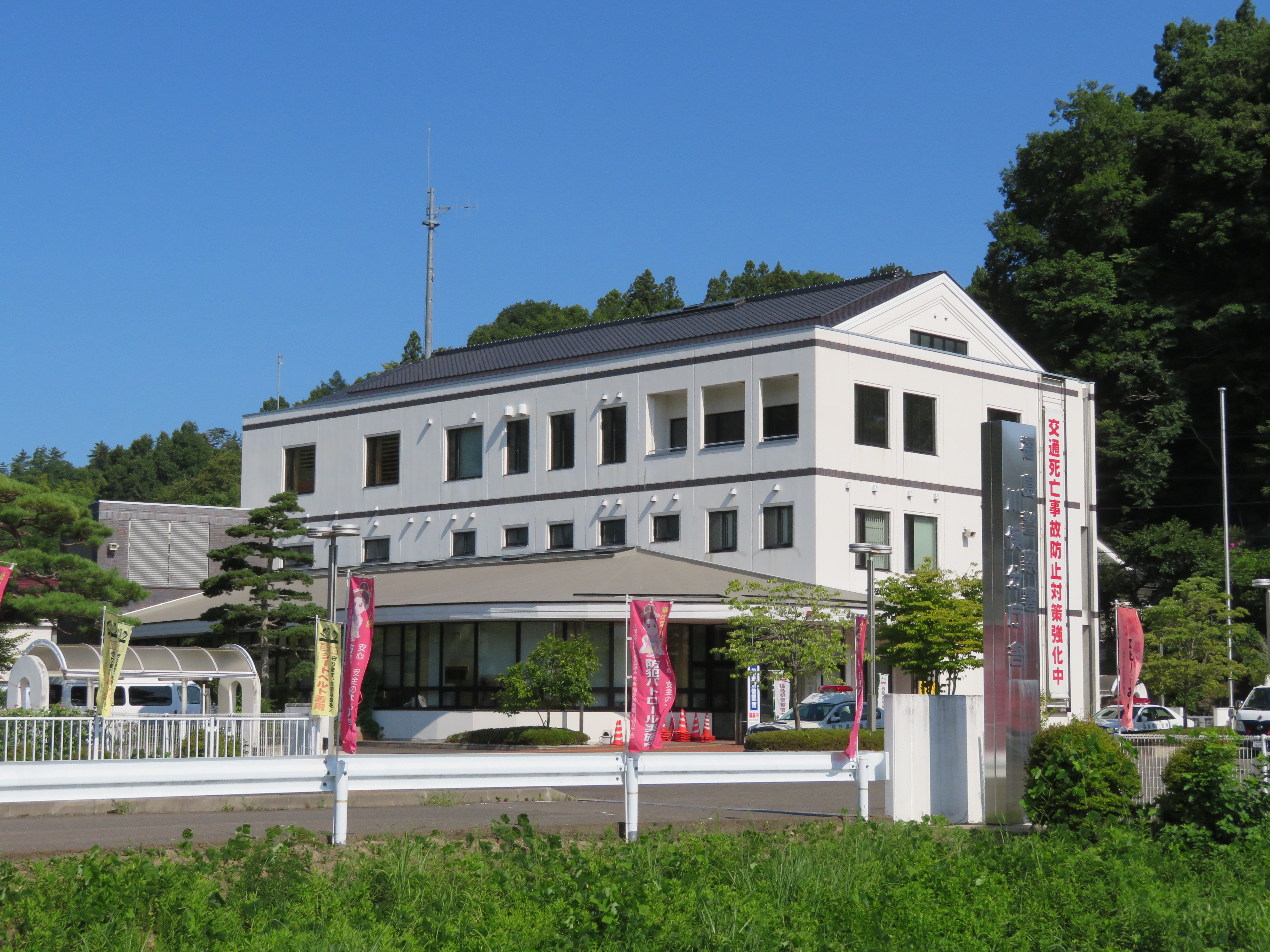 福島警察署川俣分庁舎（旧 川俣警察署庁舎） Canon PowerShot SX720 HS